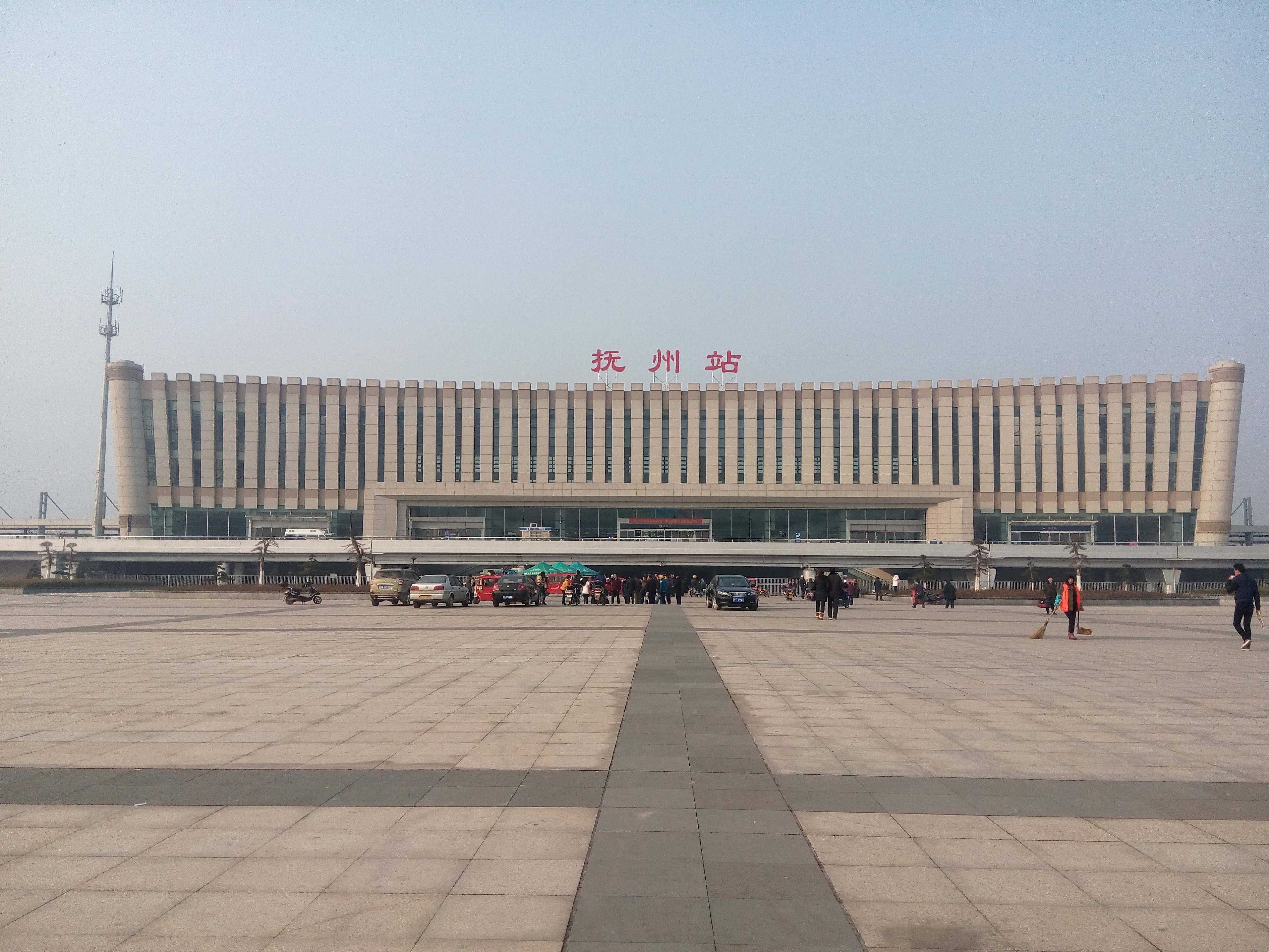 抚州站站房